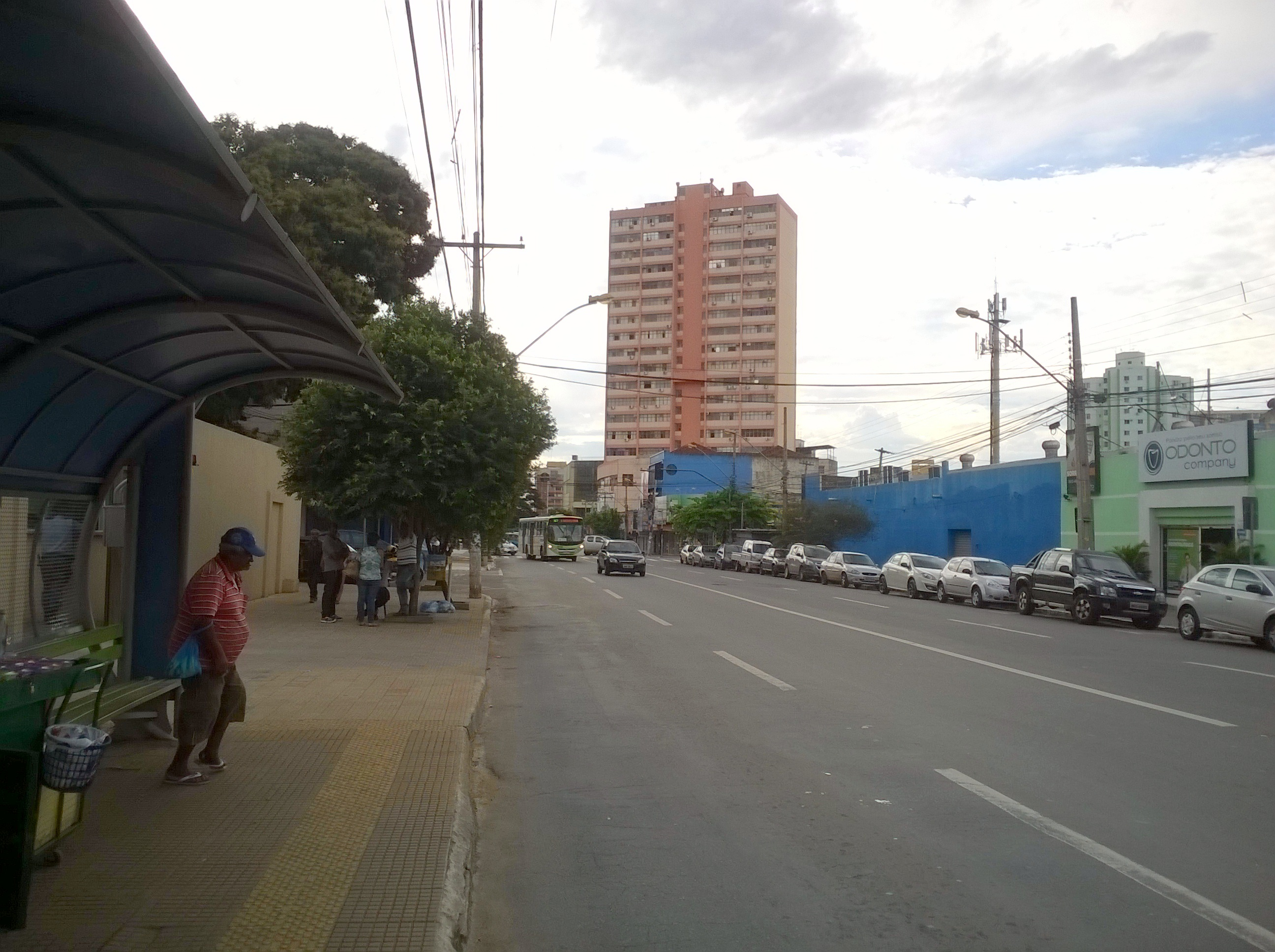 Avenida Tocantins, no Centro de Goiânia, em 29 de abril de 2015.